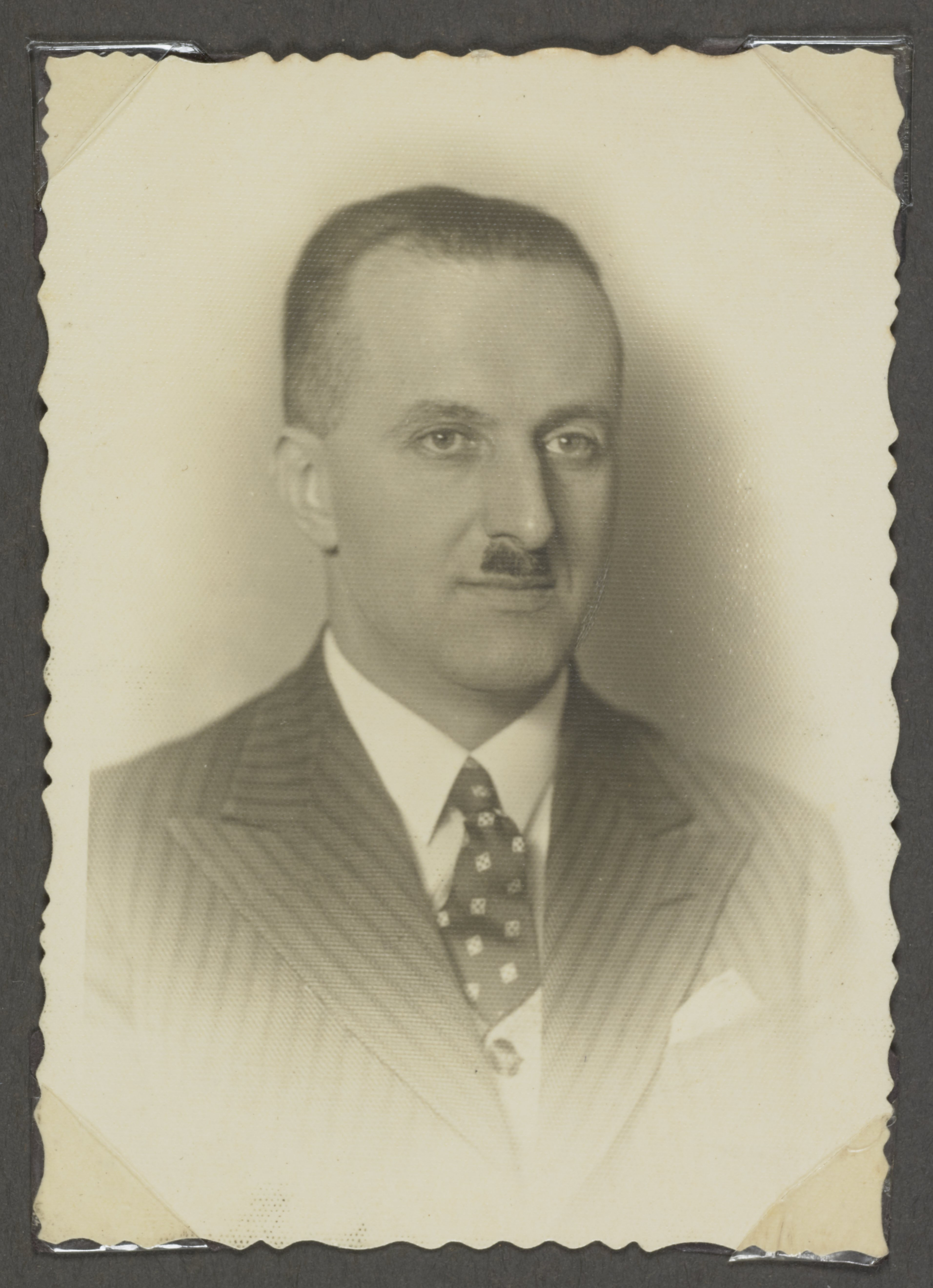 Stanisław Brzeziński, ante 1939.